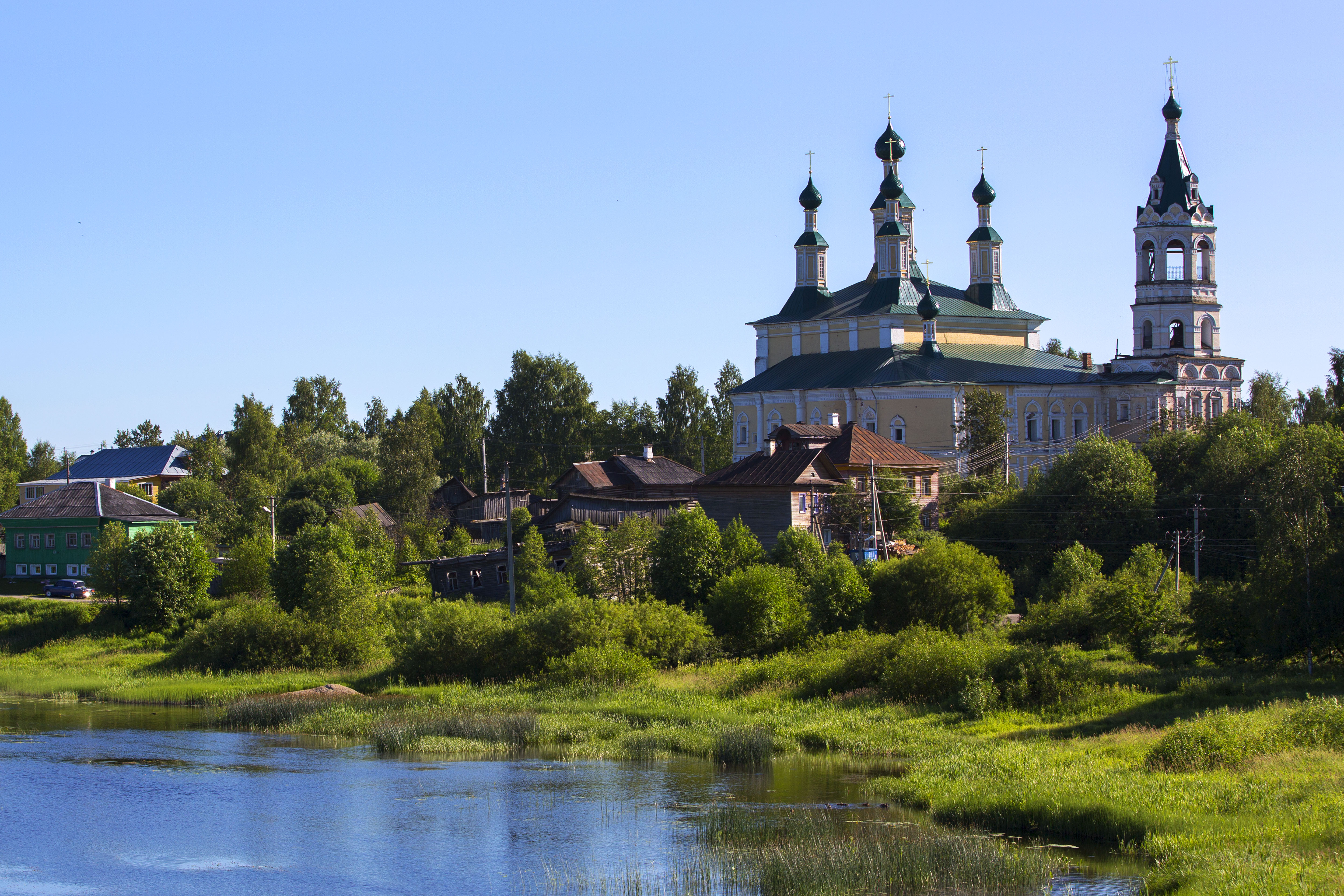 Собор Рождества Пресвятой Богородицы: улица Вылузгина, Солигалич, Солигаличский район, Костромская область